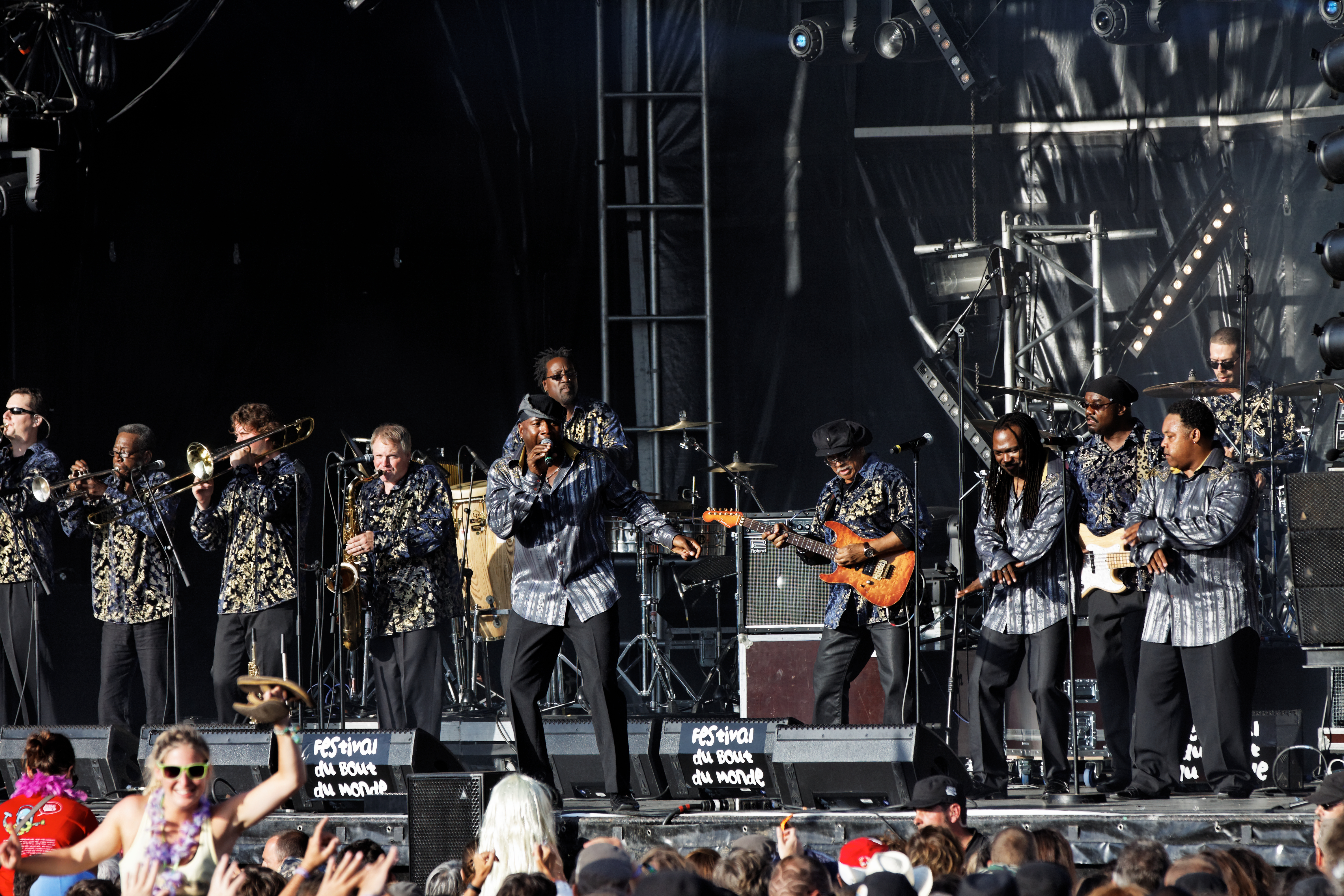 Earth Wind & Fire experience fr. Al McKay en concert sur la scène Landaoudec lors du festival du bout du Monde à Crozon dans le Finistère (France).